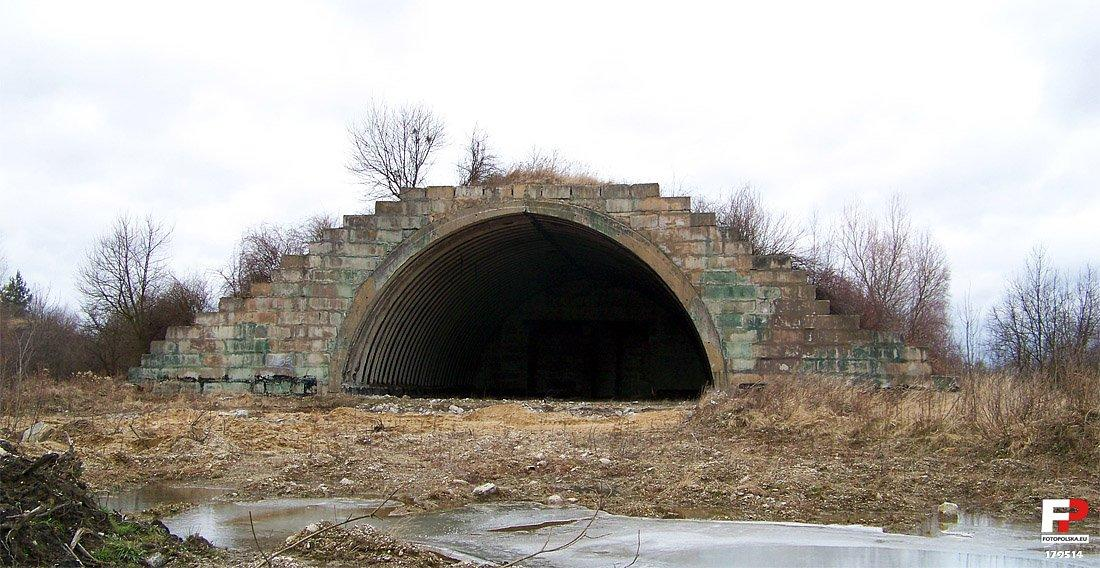 Jeden z niezagospodarowanych hangarów na lotnisku w Skarbimierzu. Pewnie w końcu zostanie zdemontowany, jak jego sąsiedzi.